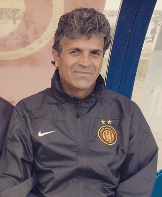 Khaled Ben Yahia